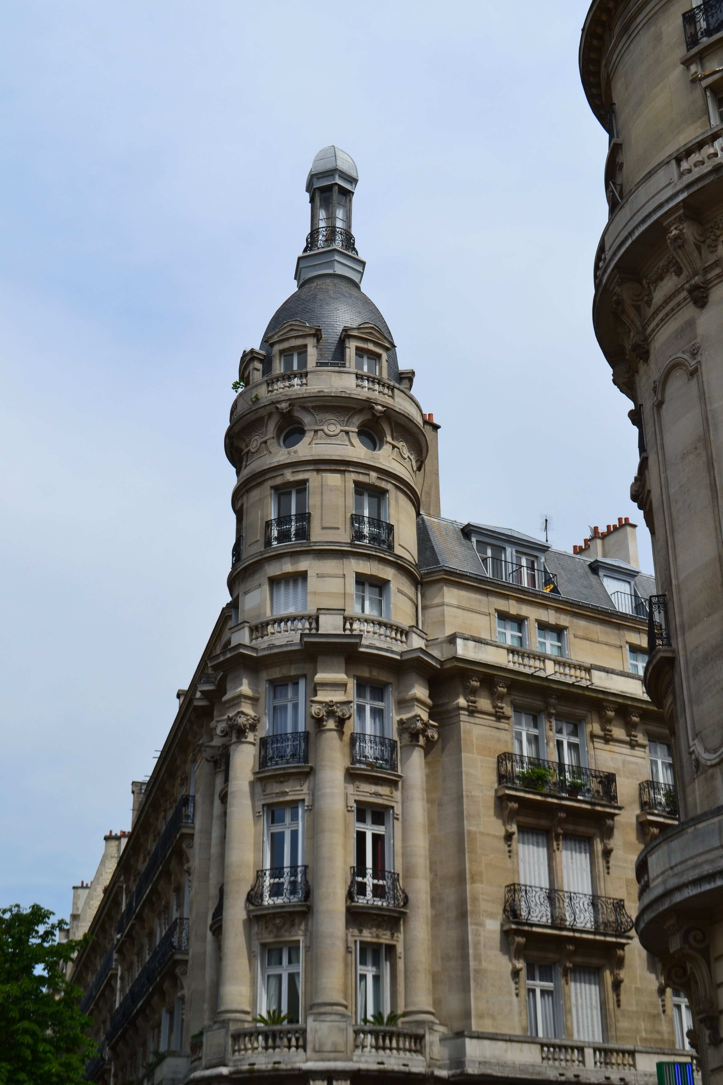 Tour d'angle du 10 rue de l'Alboni, Paris 16e ; immeuble conçu par l'architecte Louis Dauvergne (1899).